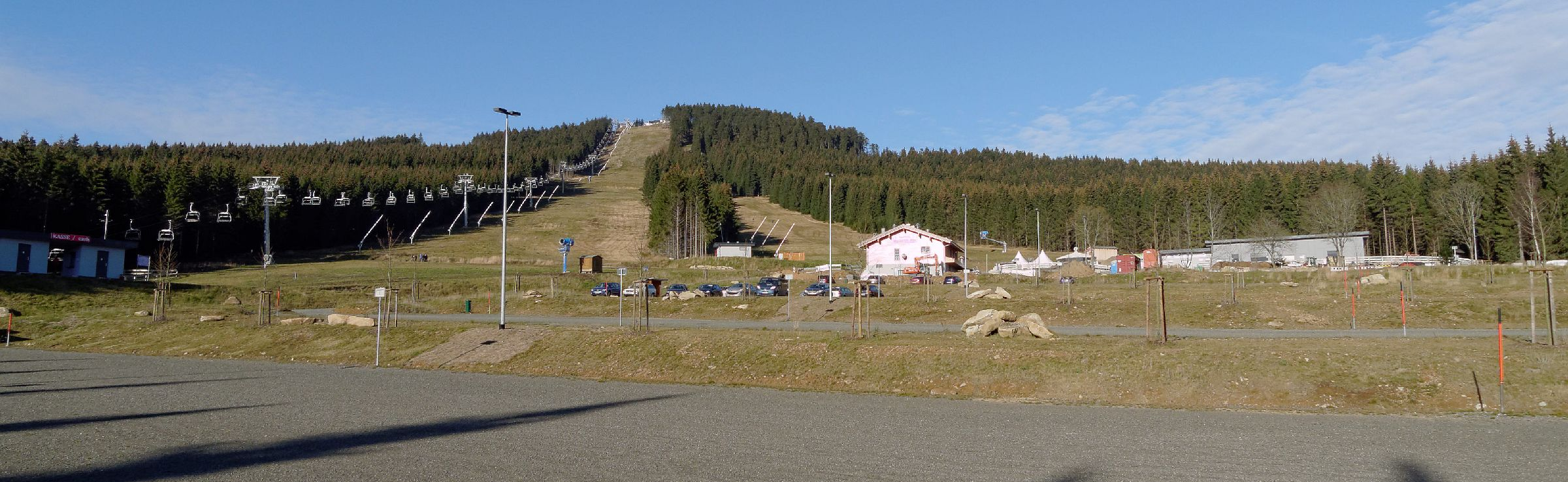 Panorama des Kaffeehorstgeländes am Wurmberg